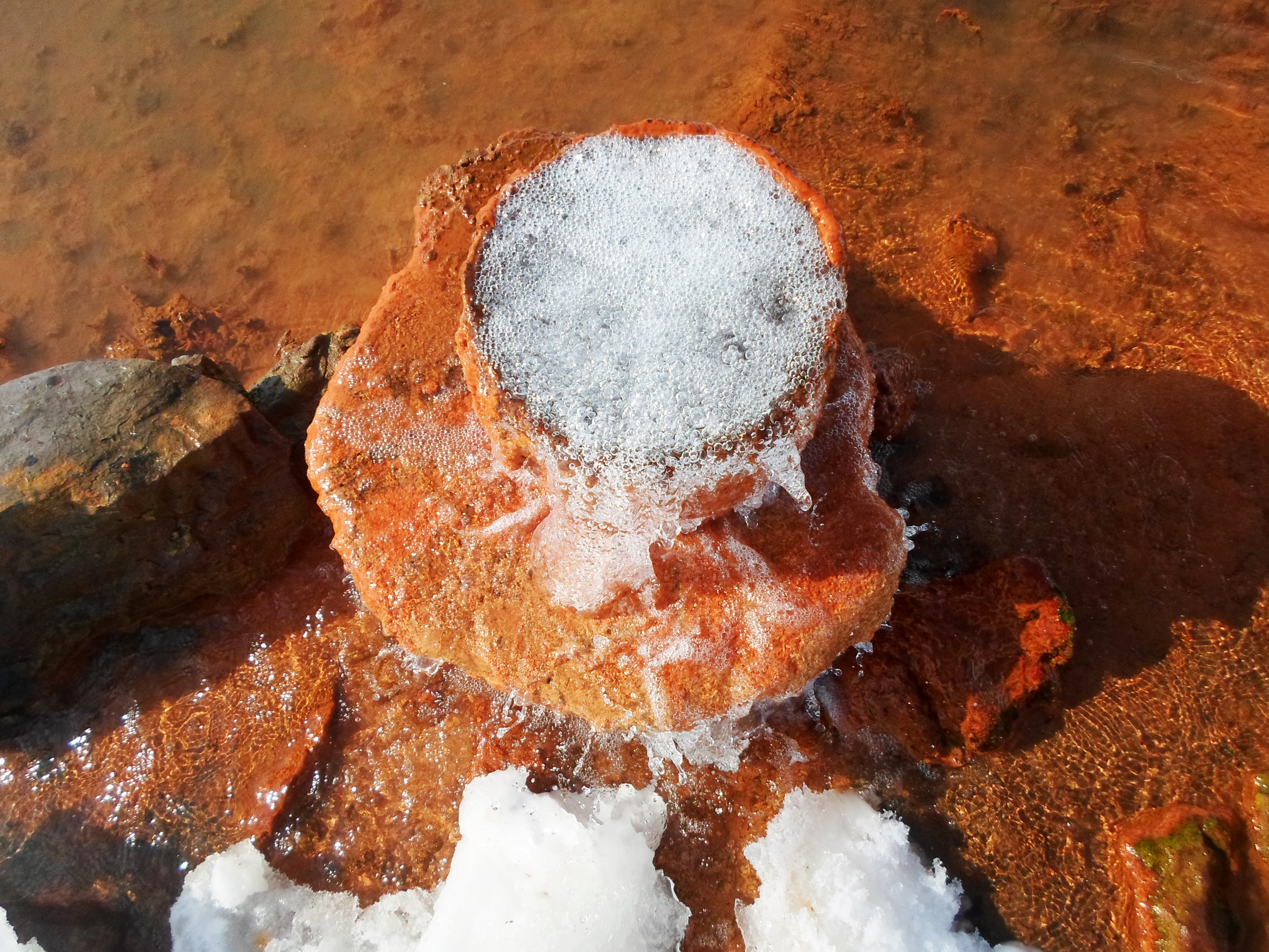 «Թթու ջուր» հանքային ջուր Շիրակի մարզի Մեծ Սեպասար գյուղում